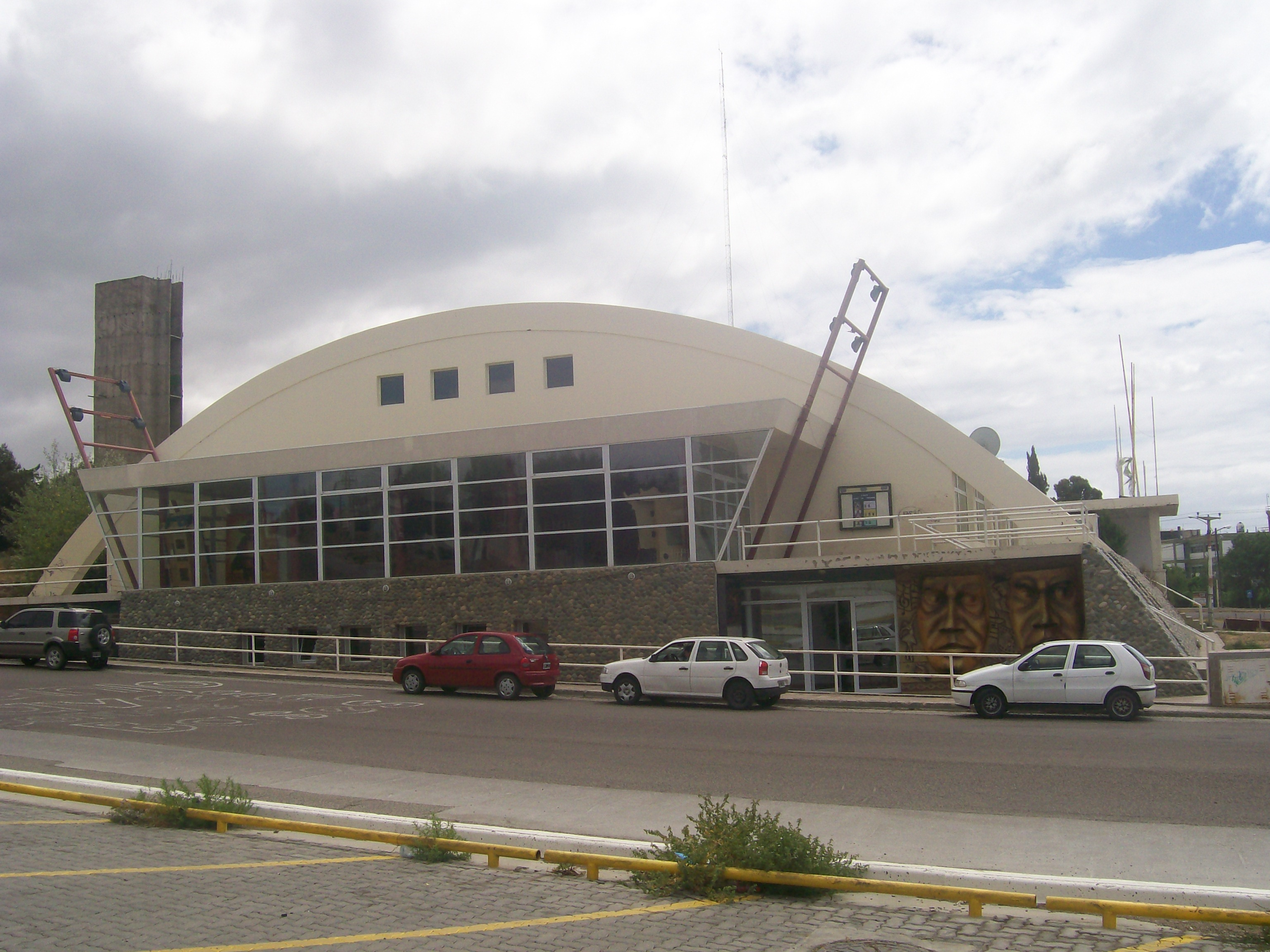 Vista al centro cultural desde otro angulo